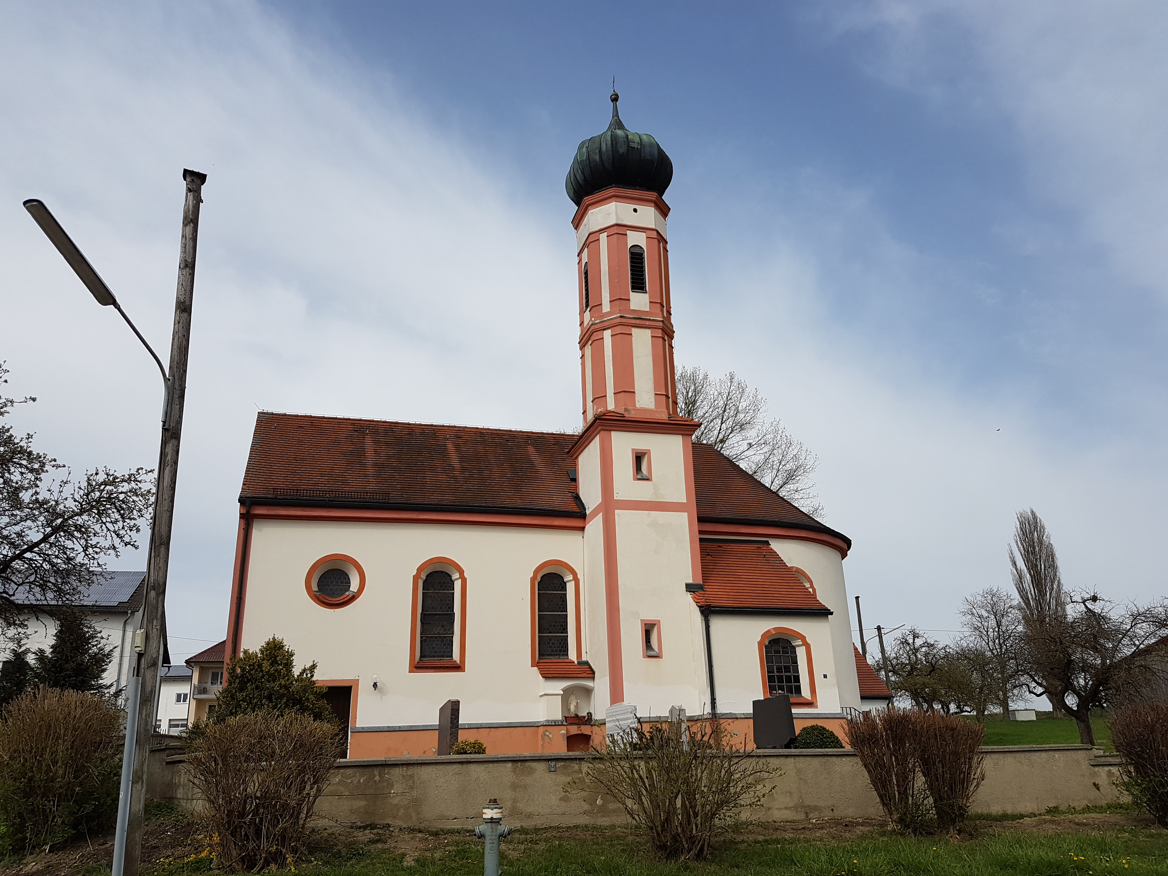 Filialkirche St. Peter u. Paul in Rudelzhofen (Röhrmoos), 1735-50 errichtet, Altäre von Nikolaus Prugger und Bildhauerarbeiten durch Bartholomäus Schuhpaur.